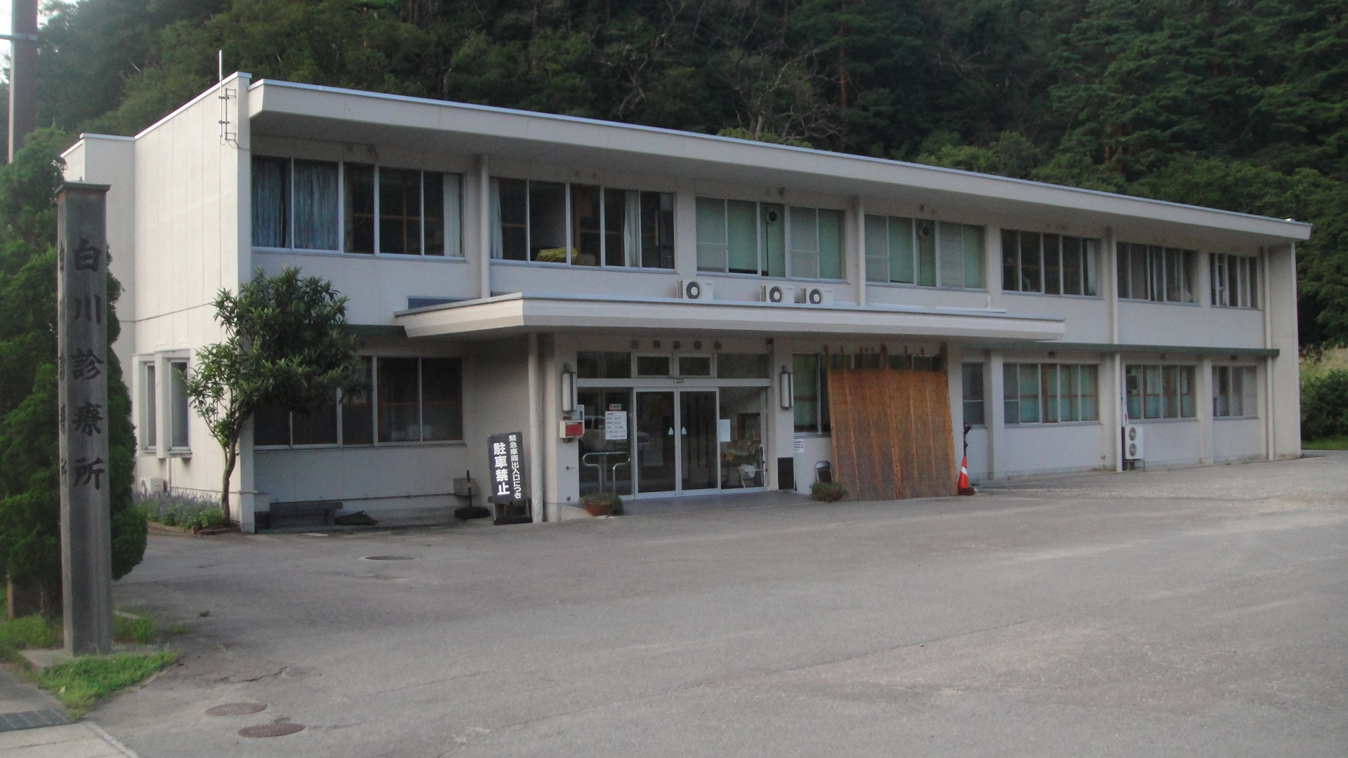 岐阜県大野郡白川村の白川診療所。ひぐらしのなく頃にの入江診療所のモデルとなった。